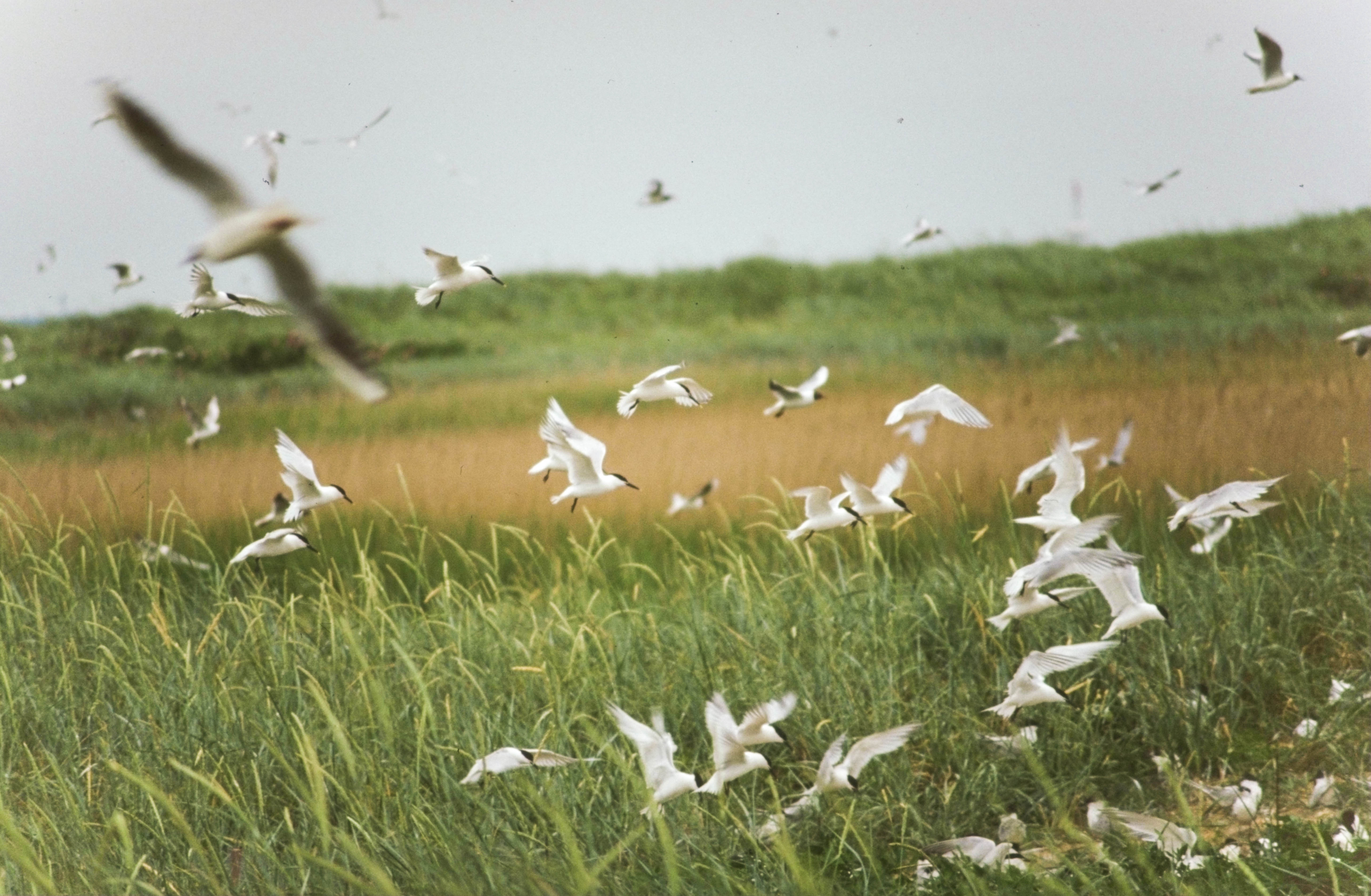 Brandseeschwalbenkolonie auf Scharhörn (Am Horizont der Neuwerker Radarturm)